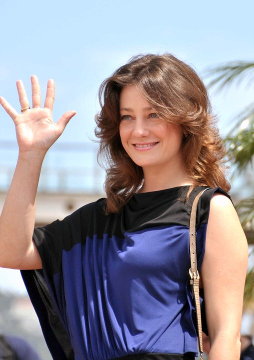 Giovanna Mezzogiorno au festival de Cannes